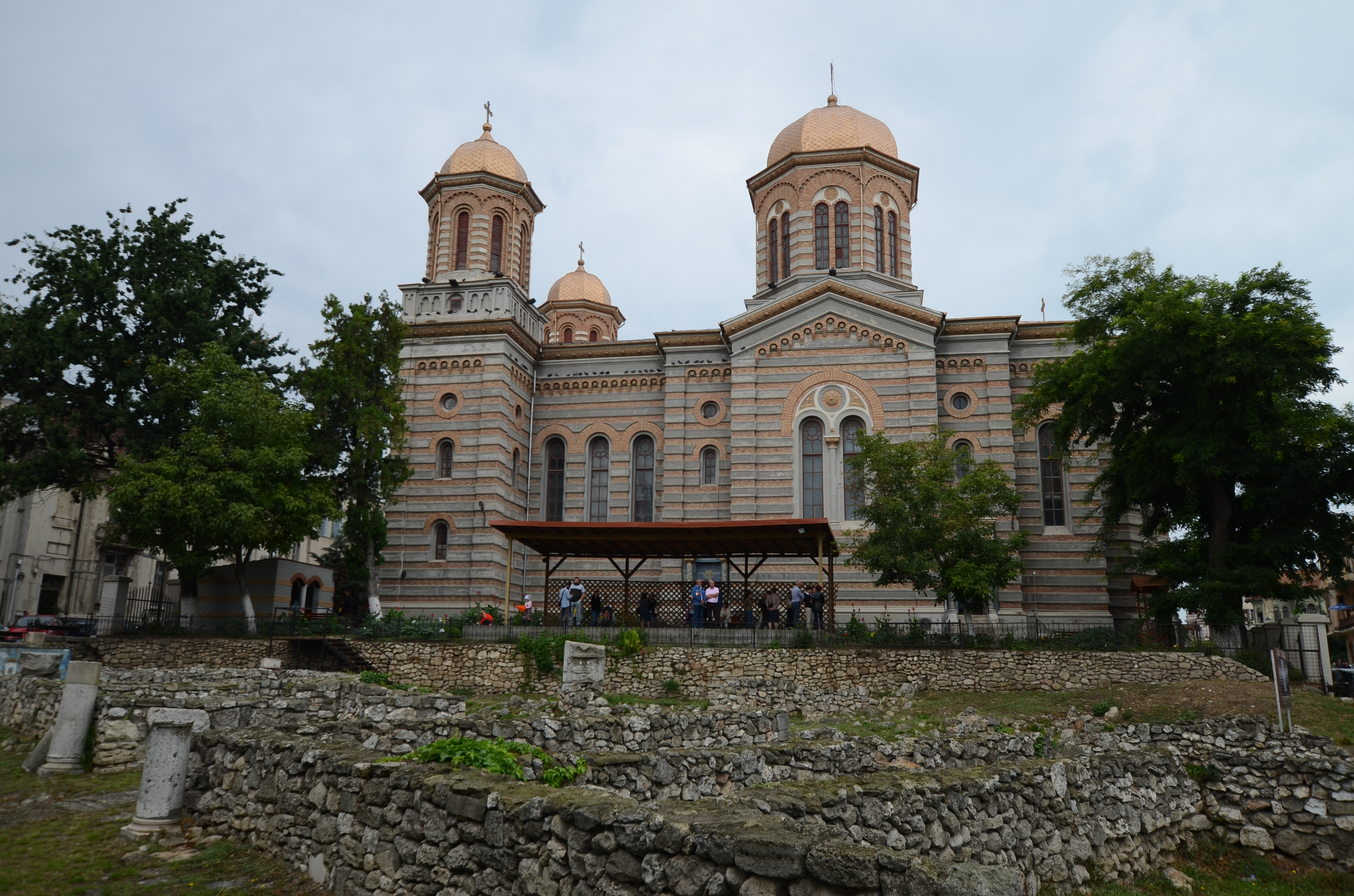 Catedrala ortodoxă „Sf. Apostoli Petru și Pavel”